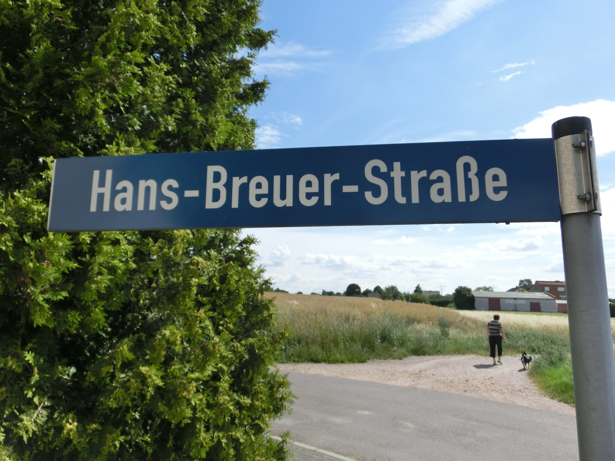 Straßennamenschild der Hans-Breuer-Straße in Kabelsketal Ortsteil Schwoitsch